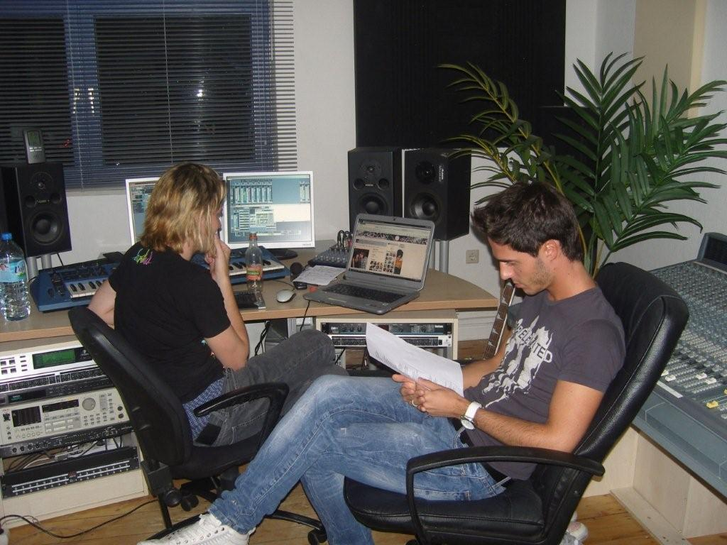 Vladimir im Studio mit Oliver de Ville